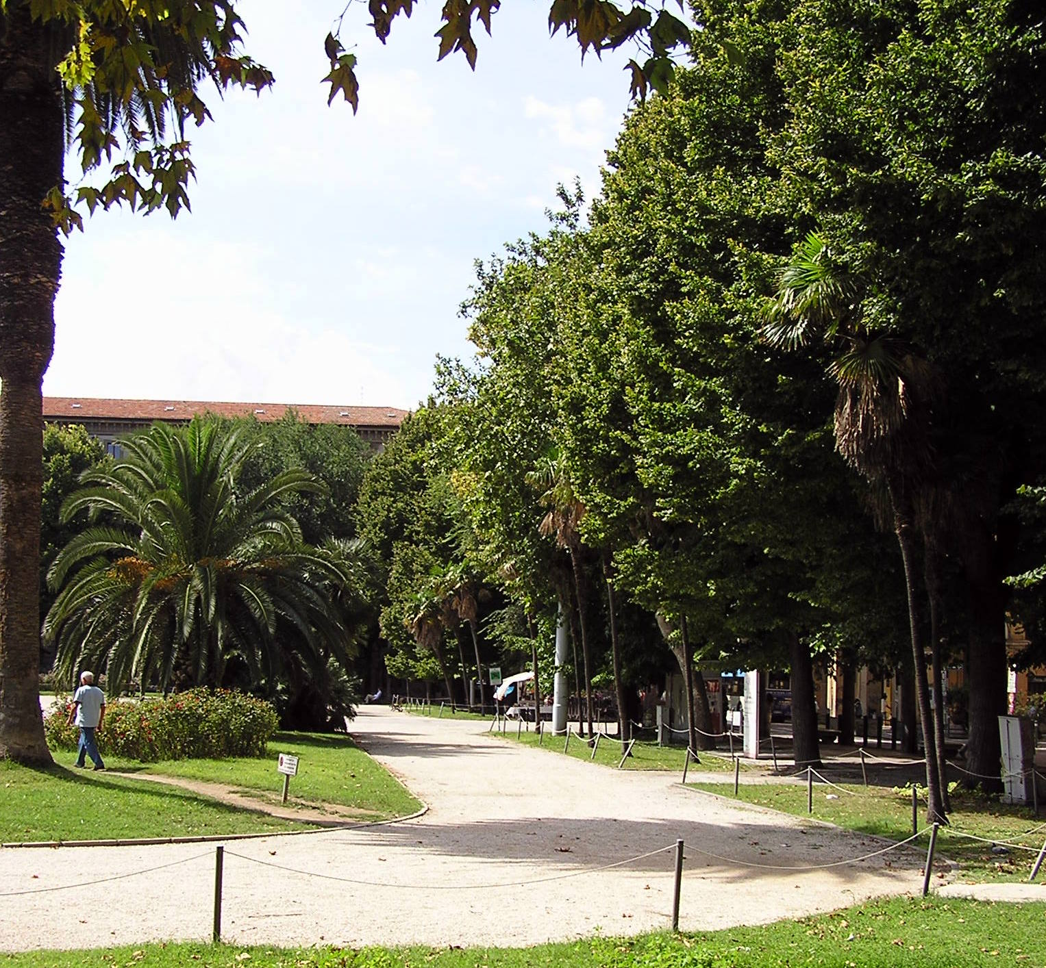 Scorcio del vialetto interno di piazza Cavour di Ancona